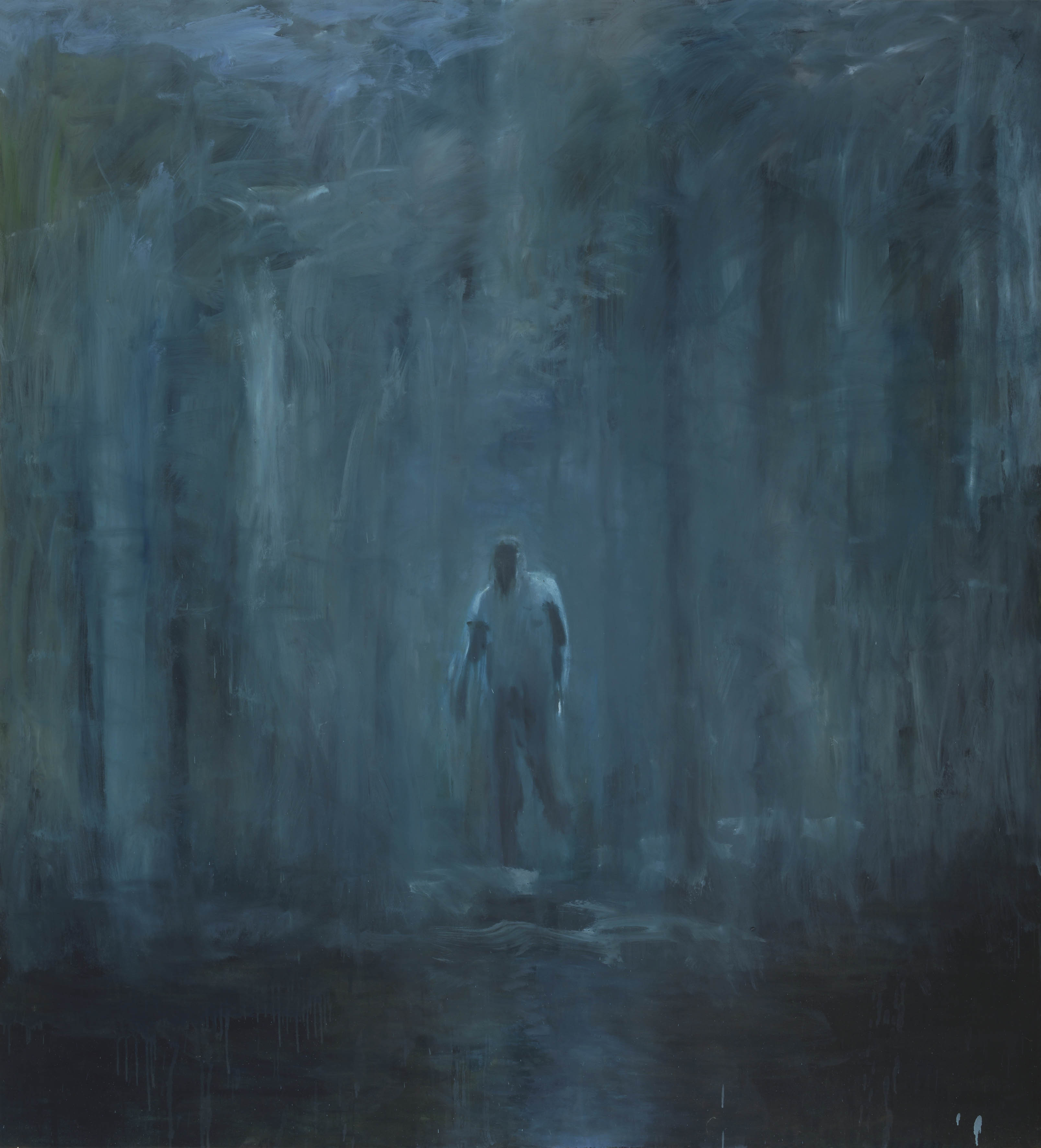 220 x 200cm 2013, Demolition man, óleo sobre tela